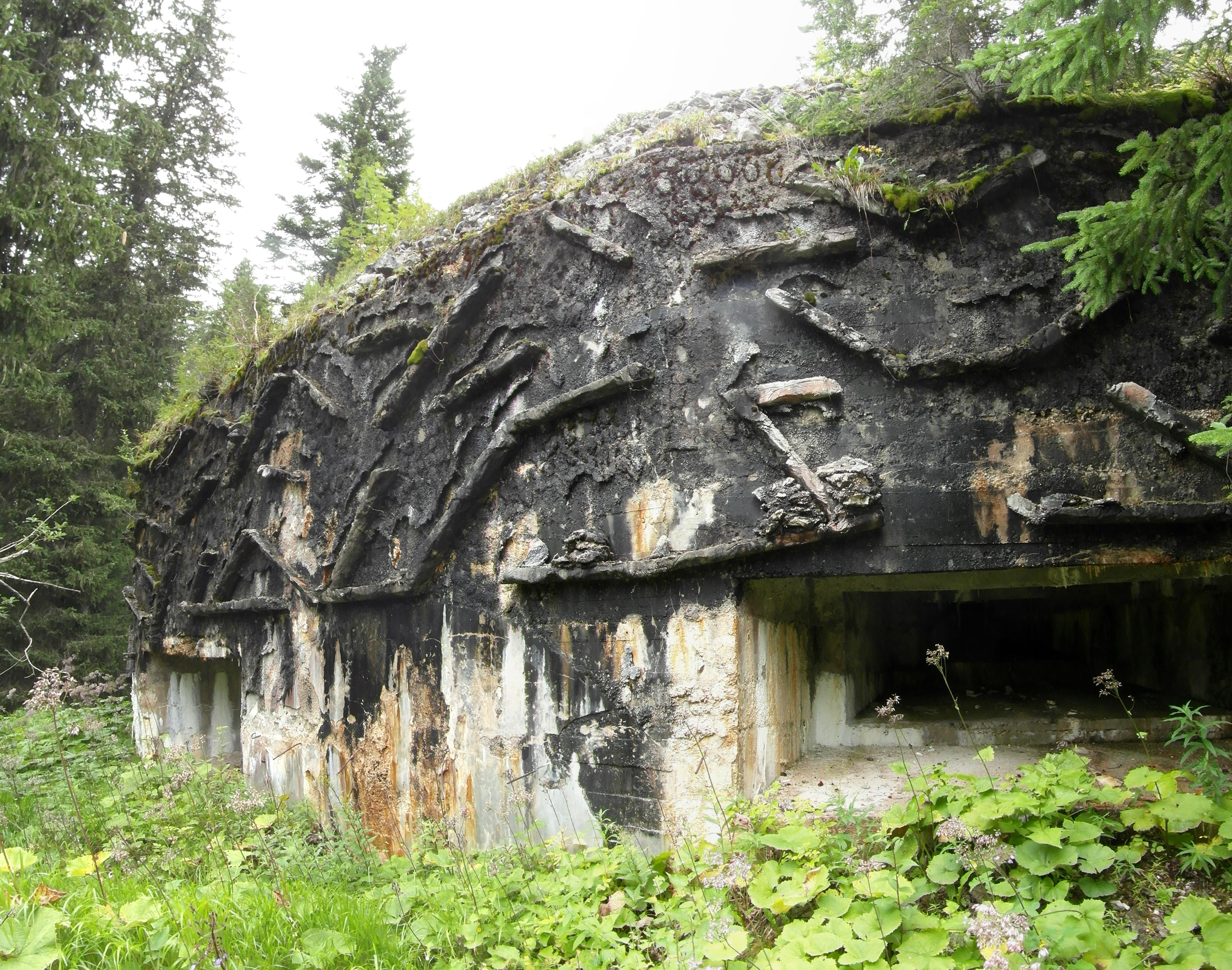 Opera 7 Passo Monte Croce di Comelico